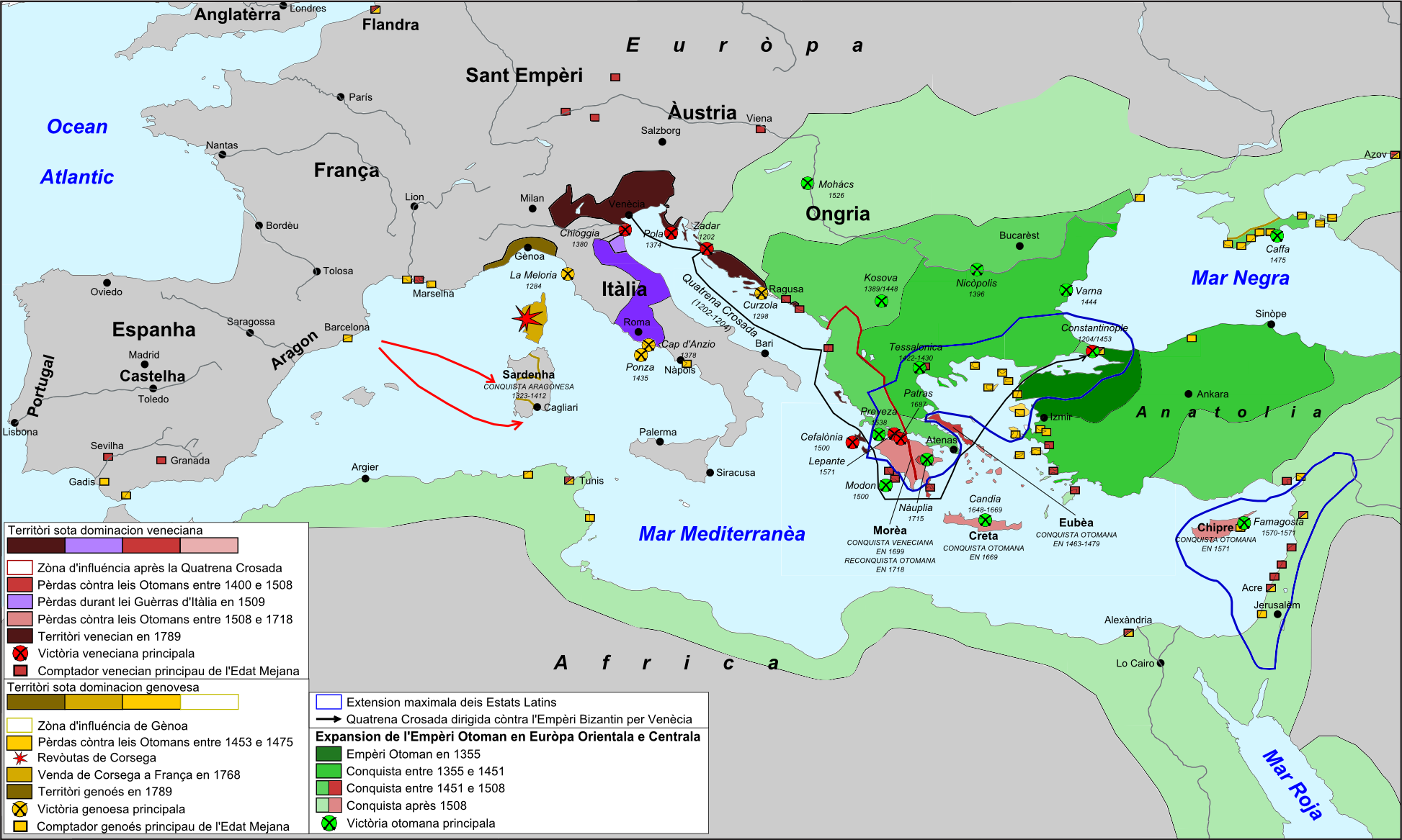 Expansion e declin dei Republicas de Venècia e de Gènoa.